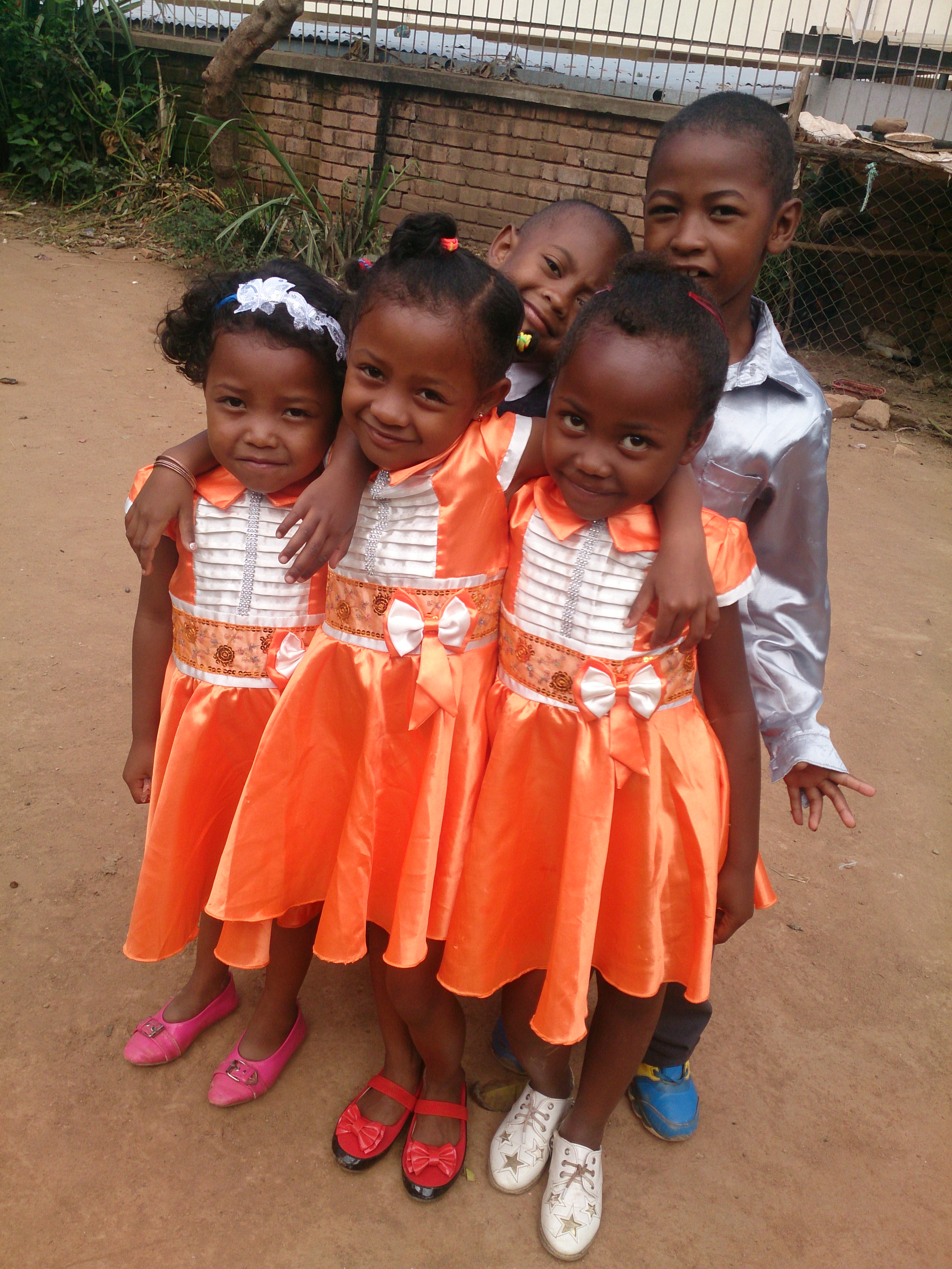 Enfants Malgaches pendant une fête de Noël